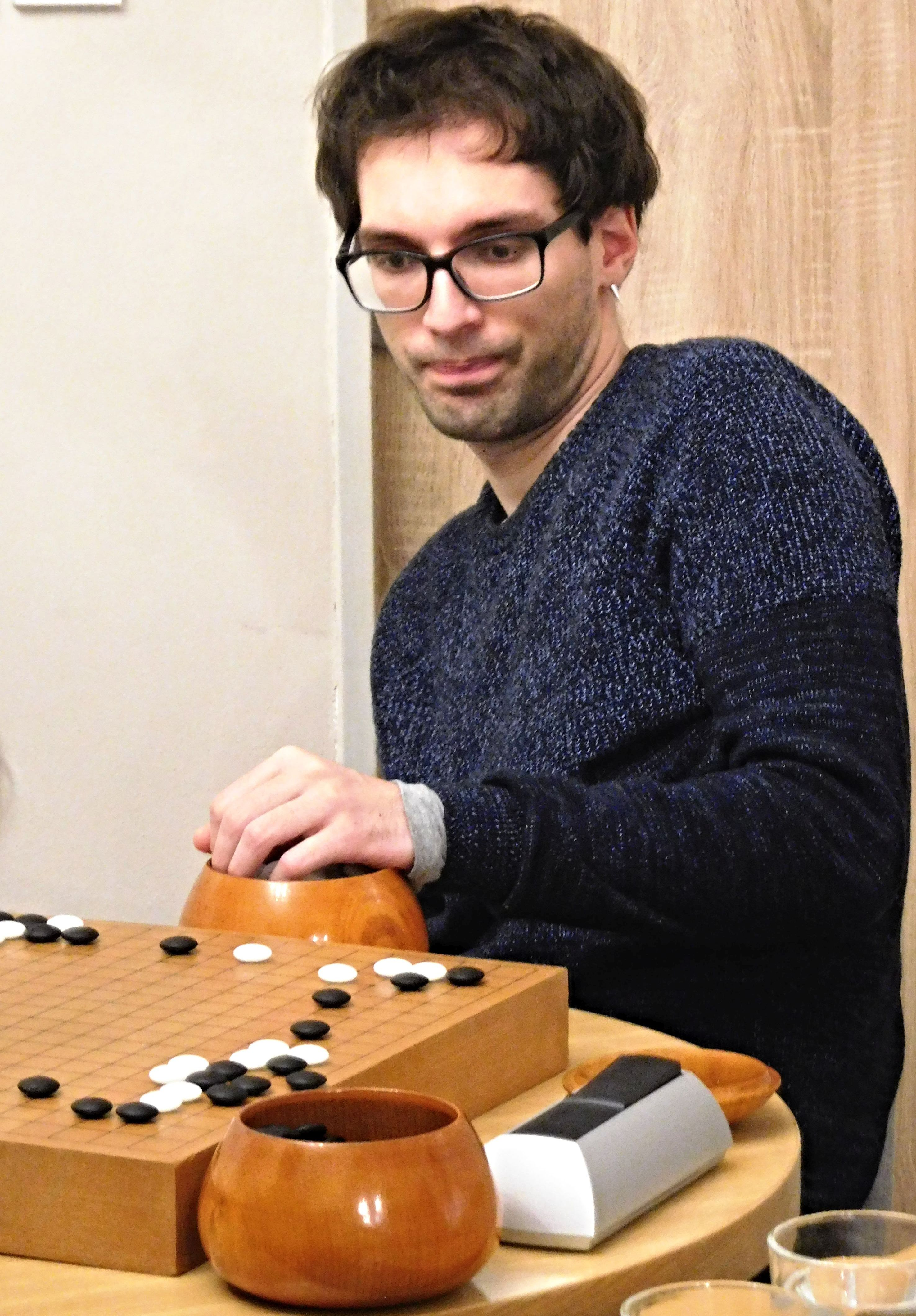 Fotografie z roku 2019 z turnaje Go Baron 2019 v Praze